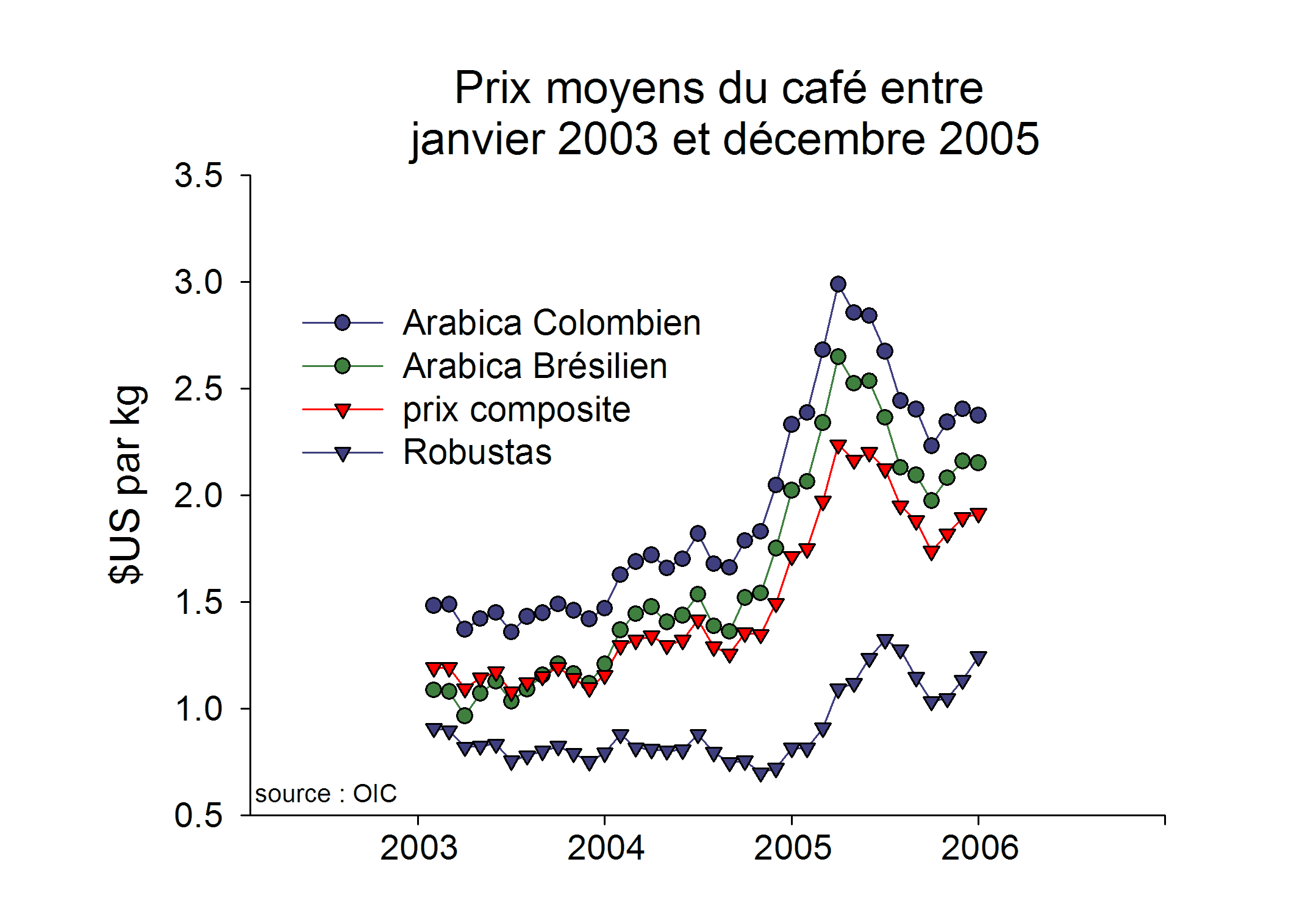 Evolution du prix du cafe en $US par kg entre 2003 et 2006.